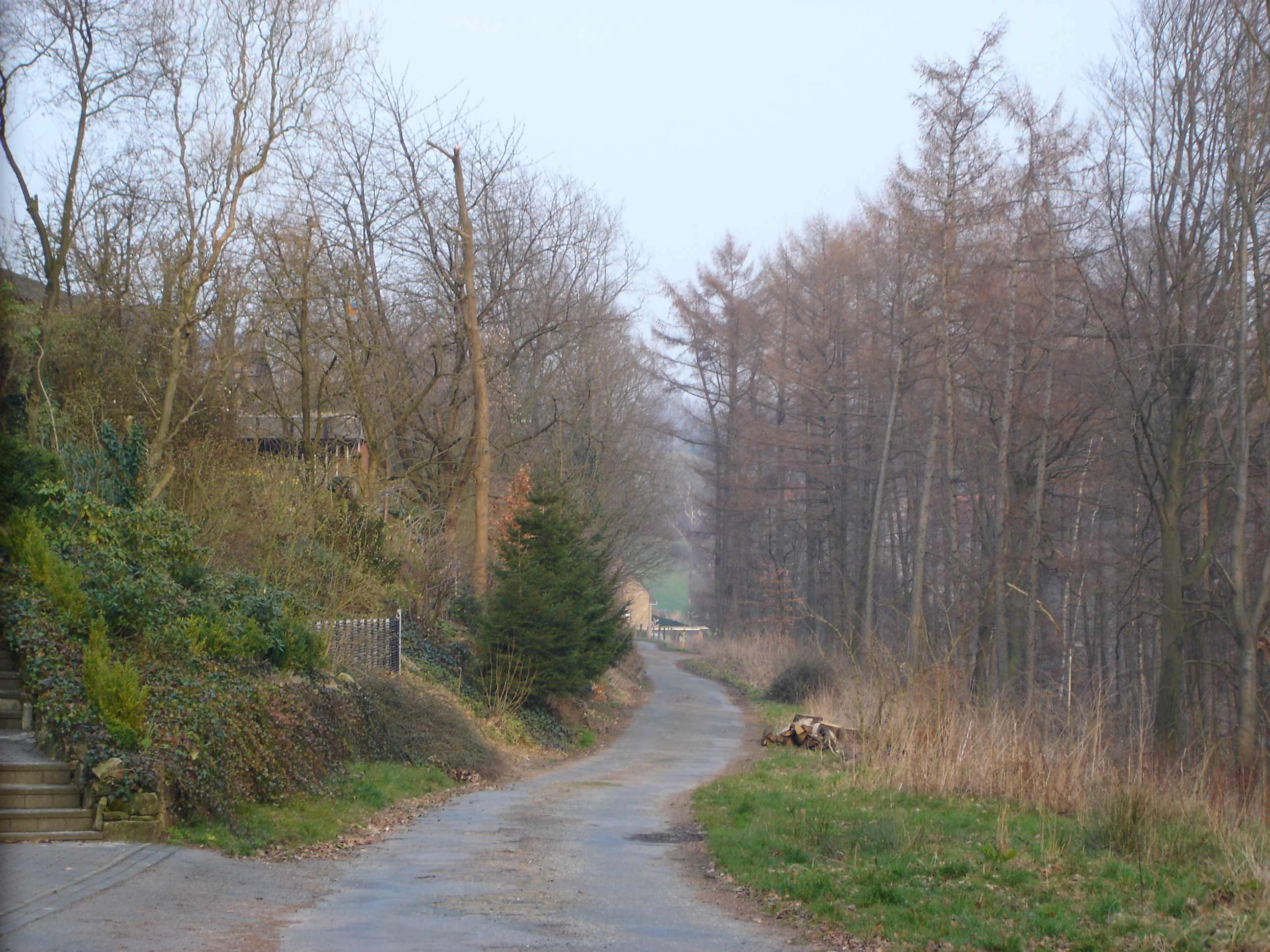 Die ehemalige Schleppbahn in Laggenbeck mit der nach ihr benannten Straße.